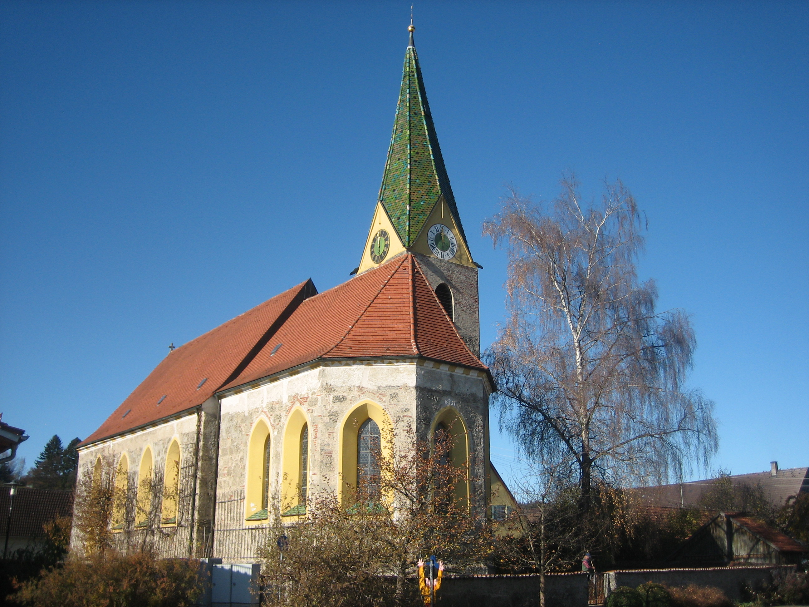 Evang.-Luth. Kirche Unser Frauen in Woringen, Landkreis Unterallgäu, Bayern